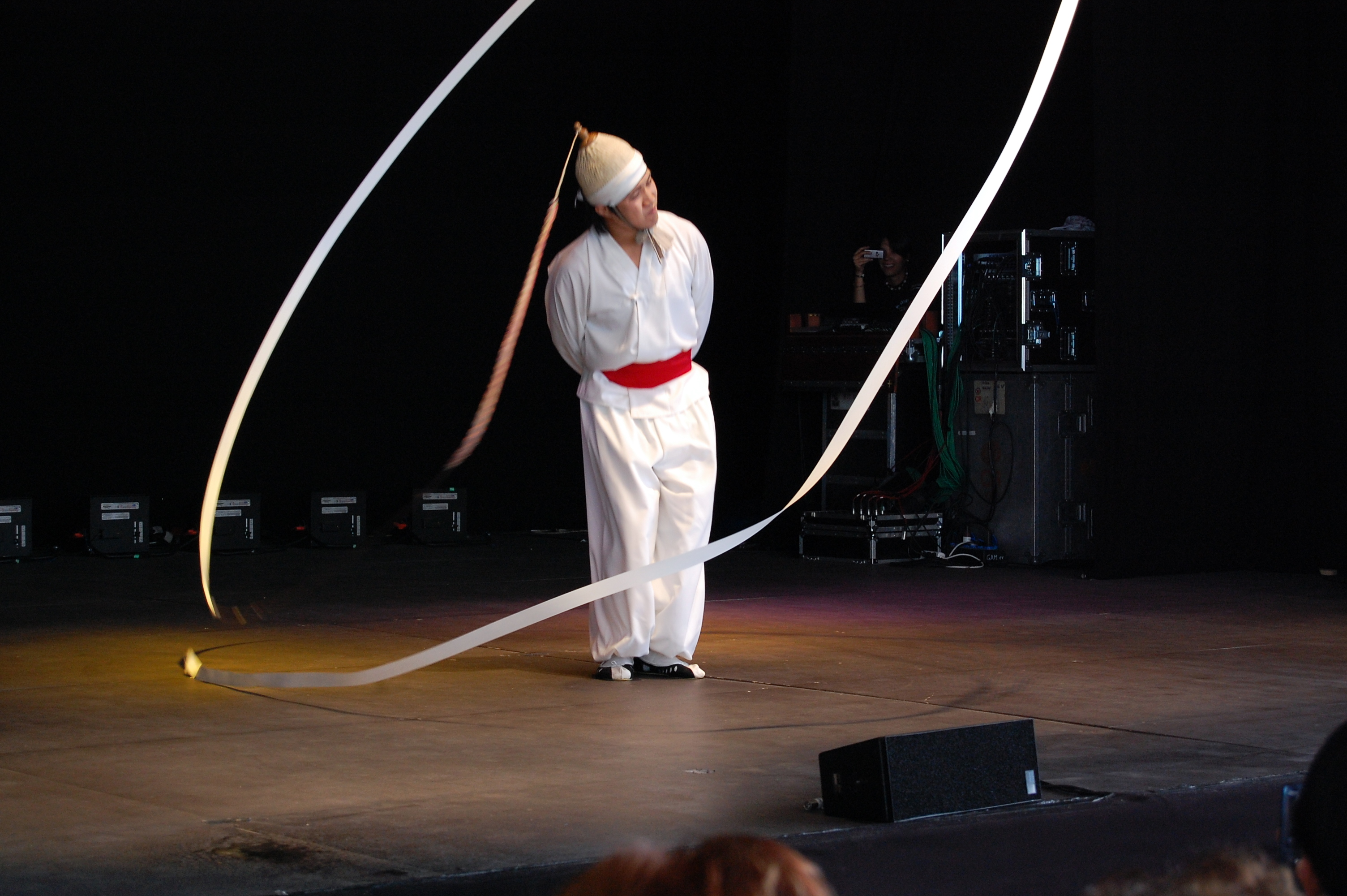 Actuación en el Balcón de las Culturas.